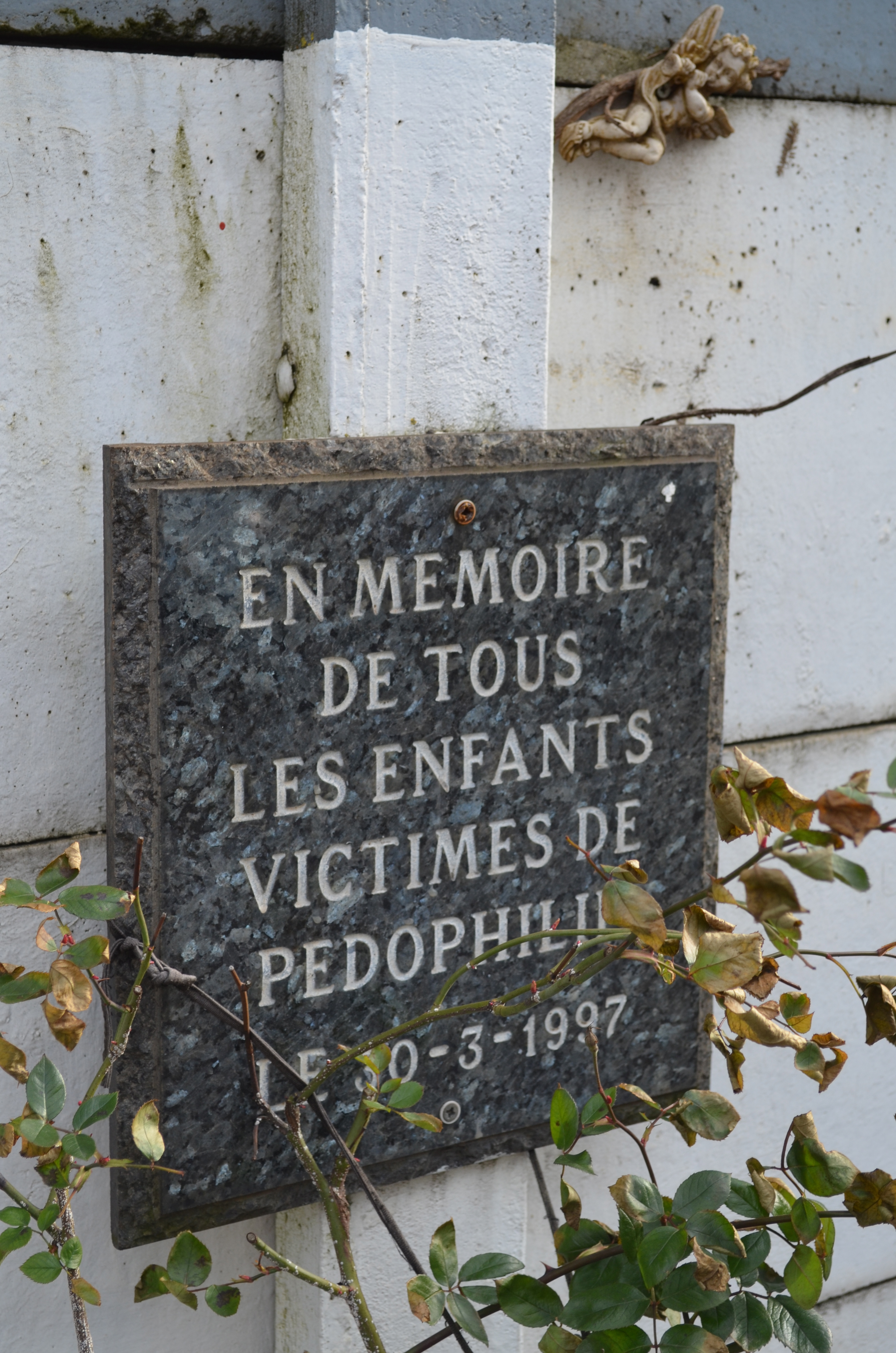 Marcinelle (Charleroi-Belgique) - route de Philippeville. En mémoire de tous les enfants victimes de pédophilie. Le 30-3-1997.